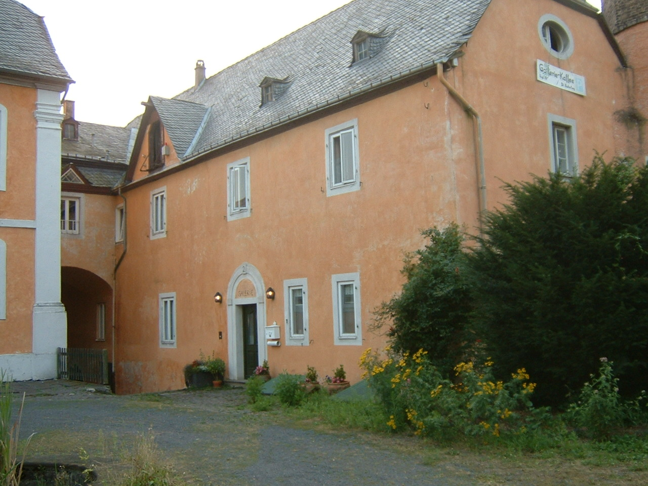 Beschreibung:Innenhof Marienburg Leutesdorf Quelle:eigenes Bild Datum: 16.September 2004 Autor:F.Lang